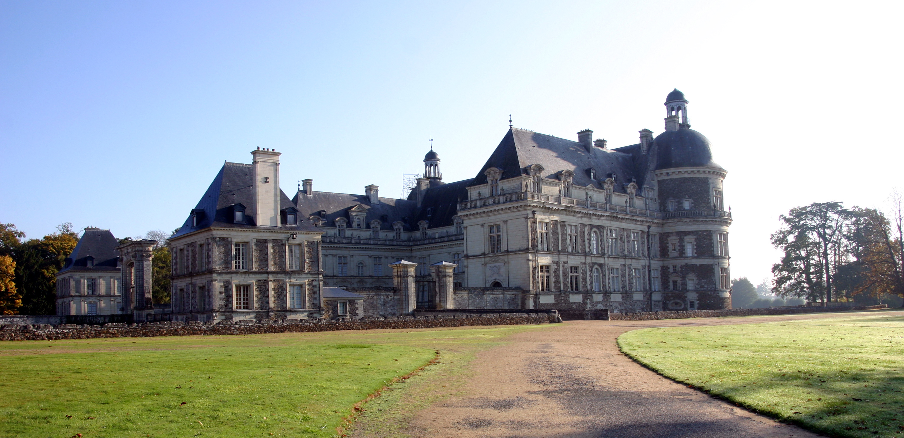 Schloss Serrant